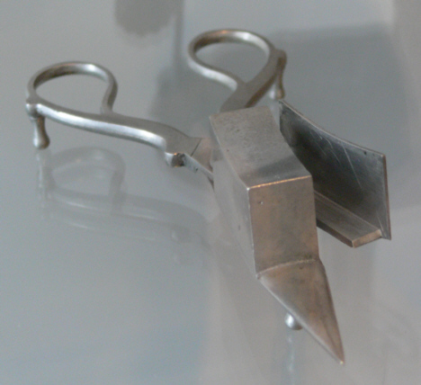 Lichtputzschere, Zinn, 19. Jh. Landesmuseum Württemberg (Außenstelle Museum für Volkskultur in Württemberg, Waldenbuch), 1.8., Inv. Nr. 1966/334